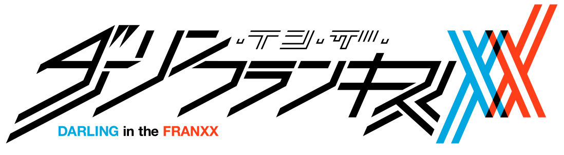 『ダーリン・イン・ザ・フランキス』(DARLING in the FRANXX) は、TRIGGER・A-1 Pictures共同制作による日本のテレビアニメ作品。